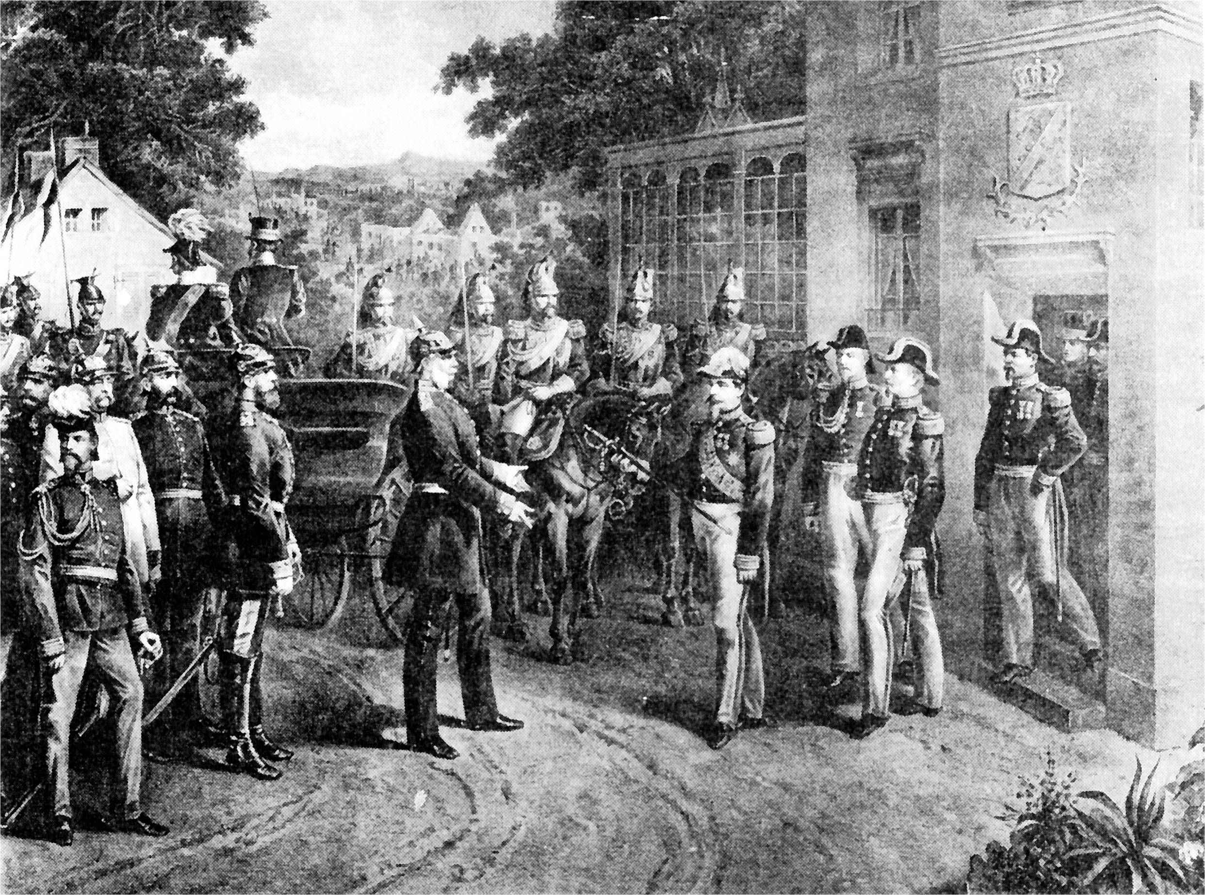 Deutsch-Französischer Krieg: Napoleon III übergibt seinen Degen